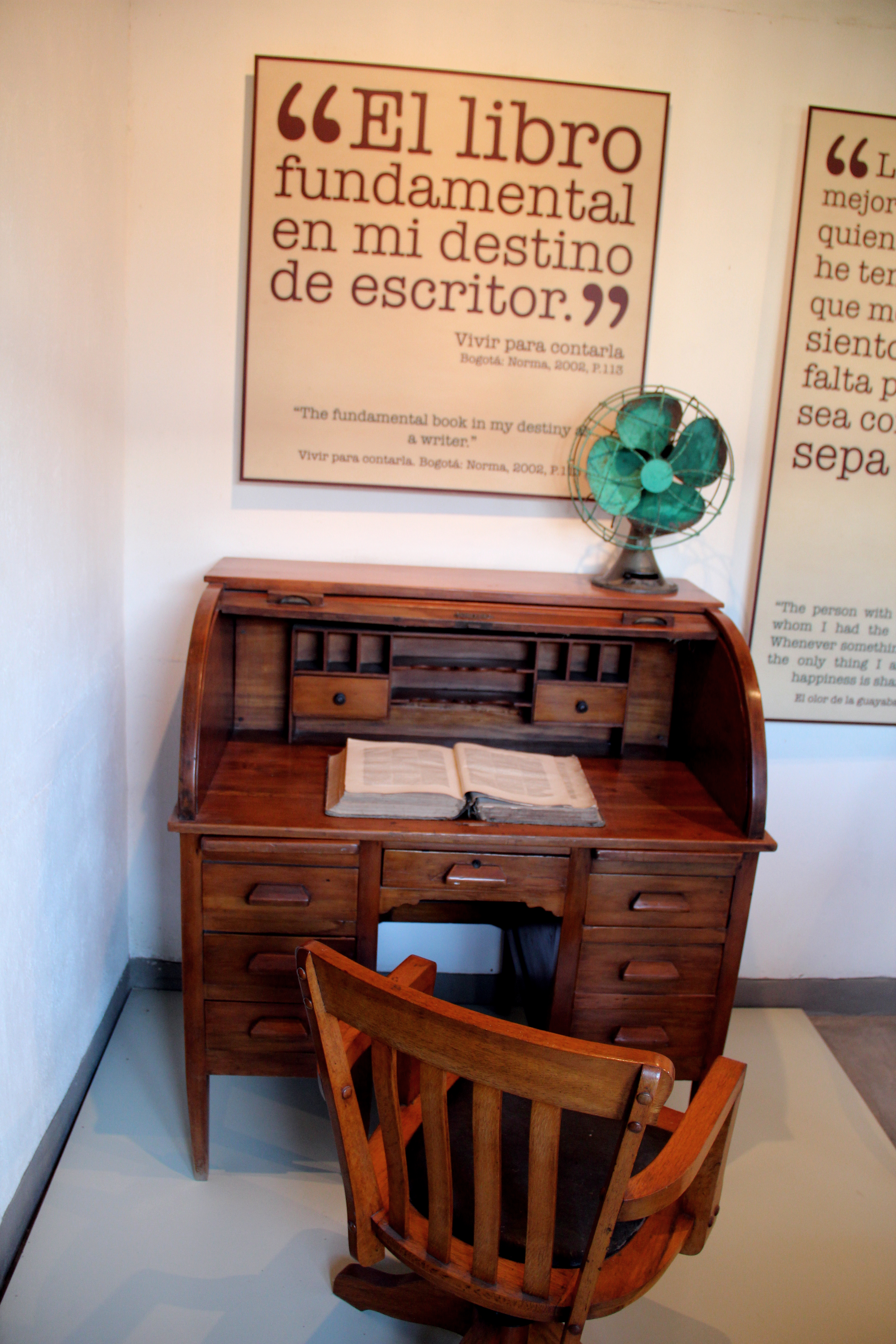 Secretero en el interior de la Casa Natal del escritor Gabriel García Márquez en el municipio de Aracataca, Departamento del Magdalena de Colombia. También conocida como Casa Museo Gabriel García Márquez. Centro Cultura. Fue declarado como bien de interés cultural a través del Decreto 480 del 13 de marzo de 1996.